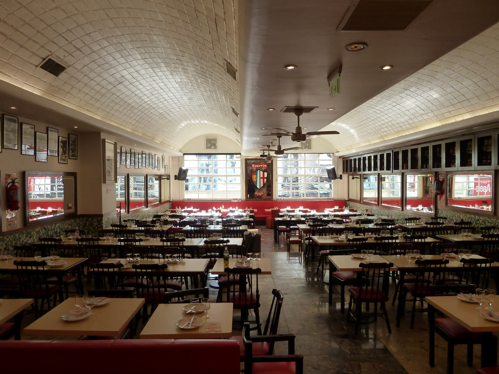 Vista del salón del segundo piso de la renombrada pizzería Güerrín de la Avenida Corrientes